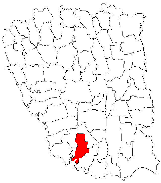 Categorie:Hărţi ale judeţului Galaţi